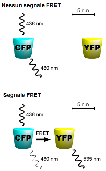 Concetto di FRET